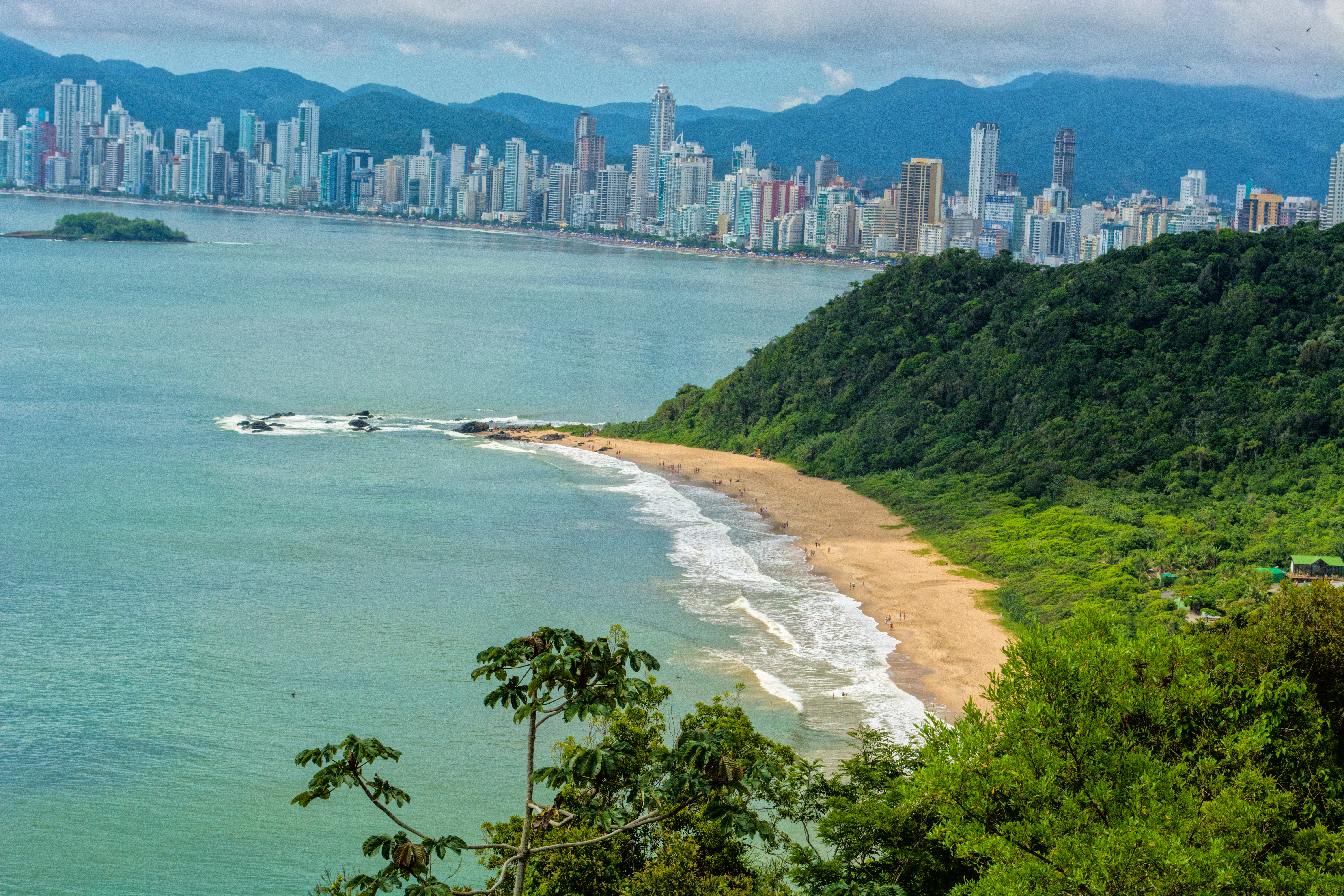 praia próxima à Balneário Camboriú,caracterizada por ondas altas e mar bravio,não muito frequentada pelos banhistas